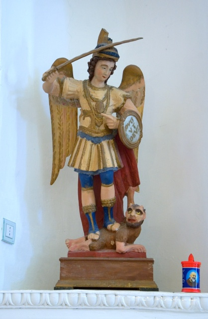 Wikipedia: Bojano.